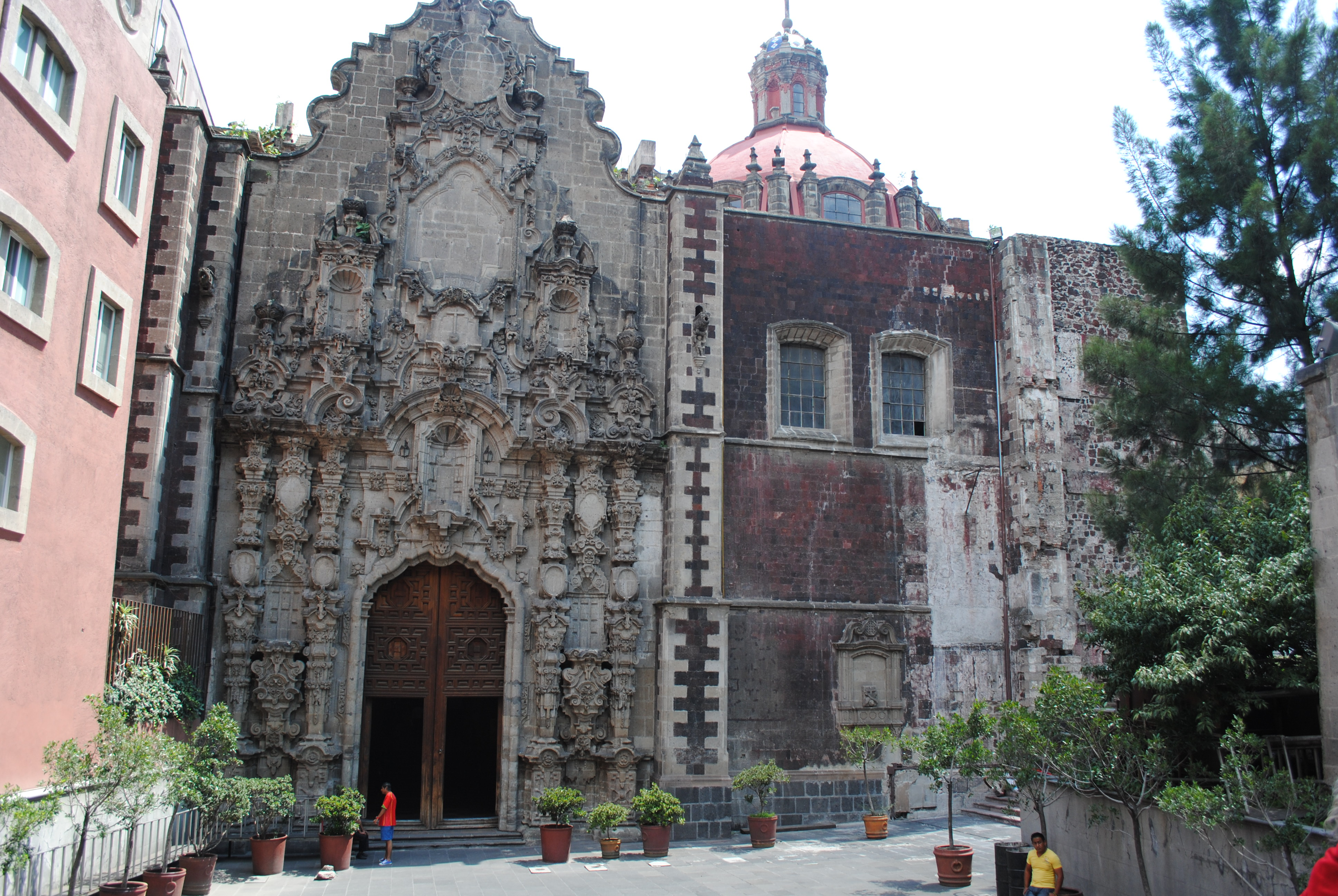 Portada del Convento de San Francisco, Centro Histórico de la Ciudad de México.